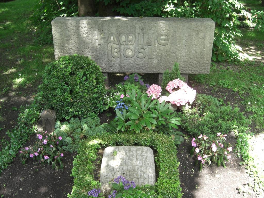 Grab des Tänzers Heinz Bosl (1946-1975) auf dem Parkfriedhof in München-Untermenzing.